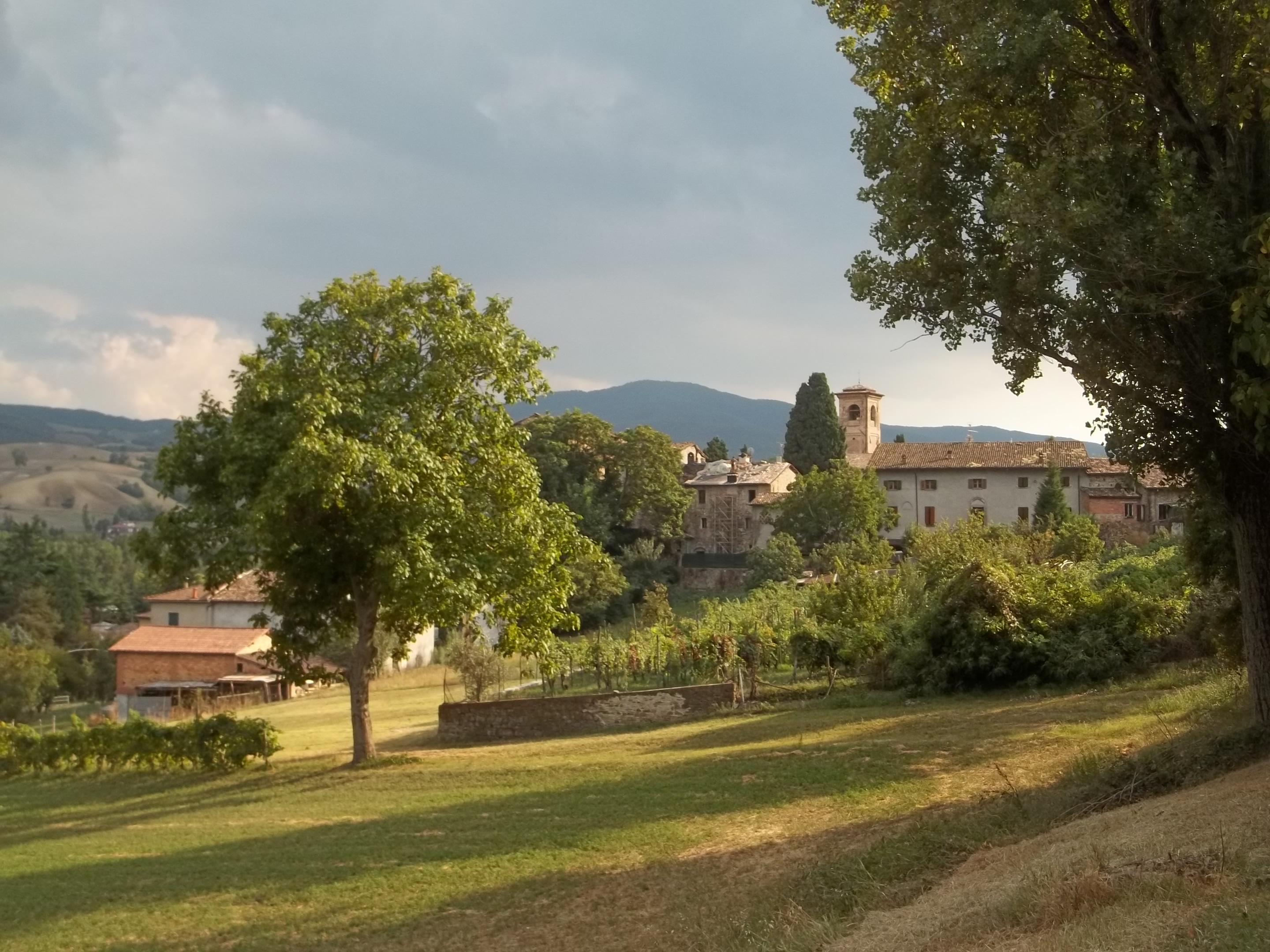 Vista di San Vitale Baganza